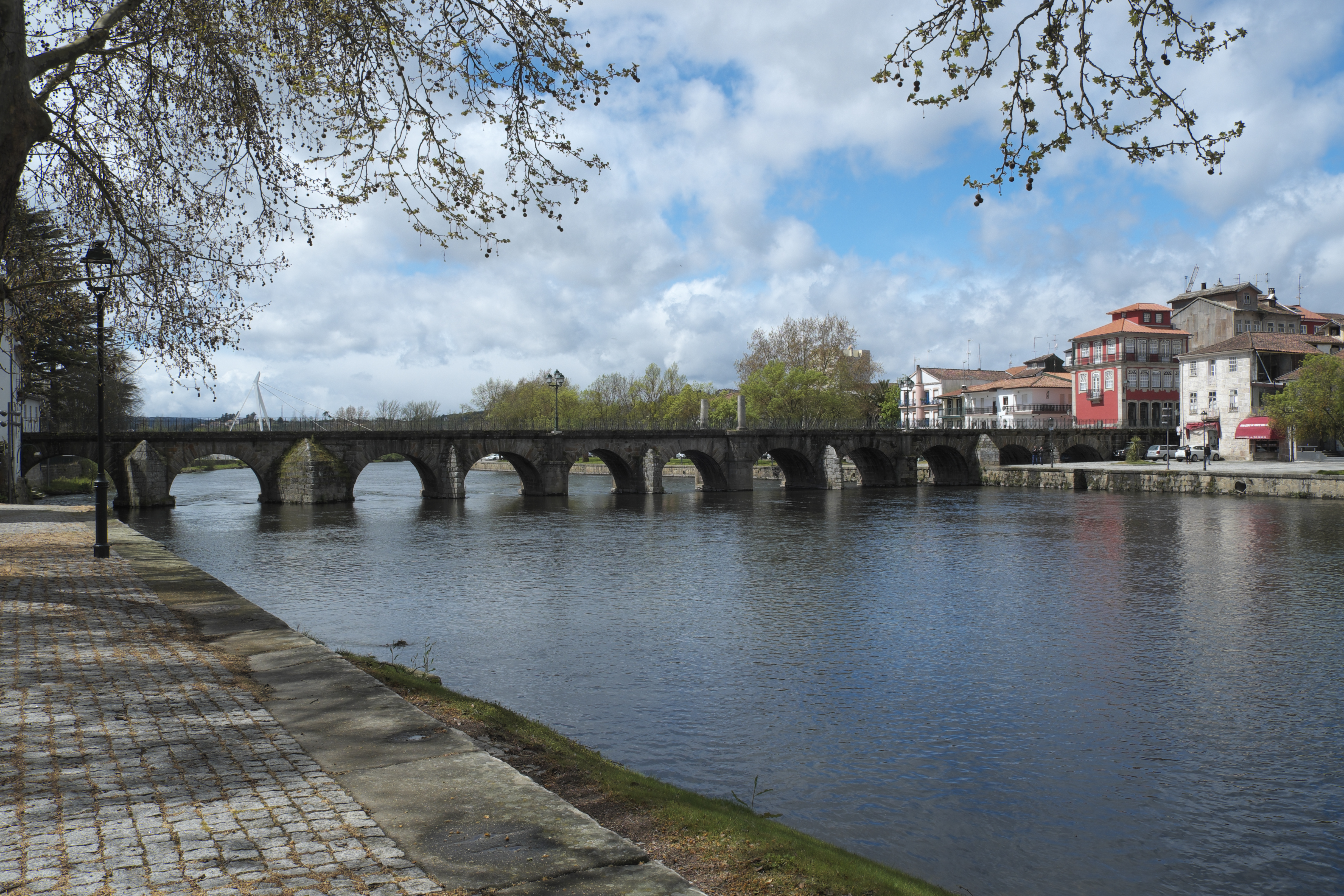 Ponte de Trajano (Römische Brücke) in Chaves in der Região Norte (Portugal)